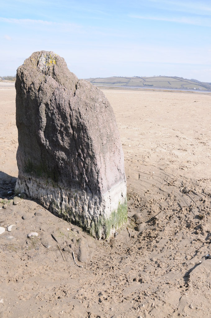 Bronze Age standing-stone, known as Carreg Fawr Nant Jack cc-by-sa/2.0 - © Philip Halling - .uk/p/3414476